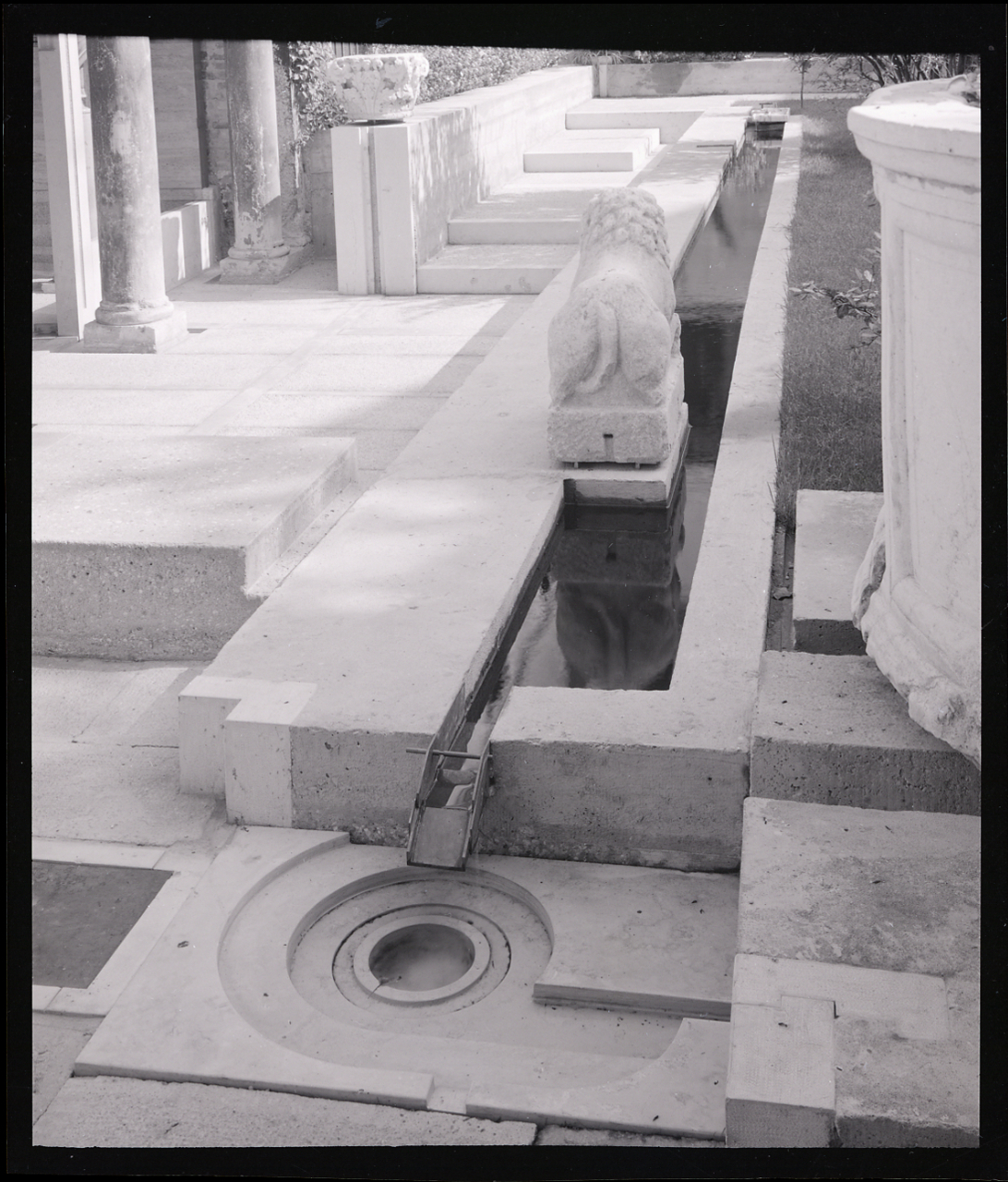 Servizio fotografico : Venezia, 1963 / Paolo Monti. - Buste: 42, Fototipi: 42 : Negativo b/n, gelatina bromuro d'argento/ pellicola ; 10x12. - ((Serie costituita da 42 buste di carta identificate con i nn.: 7146ter, 7147, 7148, 7149, 7150, 7151, 7152, 7153, 7154, 7155, 7156, 7157, 7158, 7159, 7160, 7161, 7167, 7168, 7169, 7170, 7171, 7172, 7173, 7174, 7181, 7182, 7183, 7184, 7186, 7187, 7188, 7190, 7191, 7192, 7193, 7194, 7195, 7196, 7197, 7198, 7200, 7220. - La busta denominata 7146ter riporta l'iscrizione: "Galleria/ Querini/ Stampalia/ Venezia". - Confronta schede Gpbn7147-7161, Gpbn7149-7247, Gpbn7151-7156. - Occasione: Inaugurazione di Palazzo Querini Stampalia dopo il restauro di Carlo Scarpa (1959-1963). - : Archivio fino 1-4-1961/ 31-3-1963 (1961-1963), presso Archivio Paolo Monti. - Fonte: Agenda di Paolo Monti: R 1 - Monti/ 1 aprile 1963 - 6 giugno 1964/ 6000-8193 (1963-1964), presso Archivio Paolo Monti. - Fonte: Rubrica di Paolo Monti